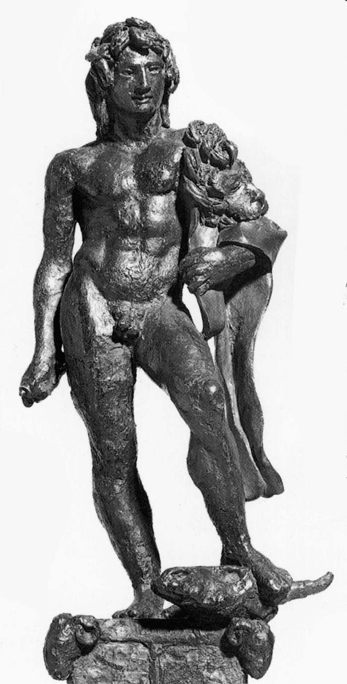 Hercules